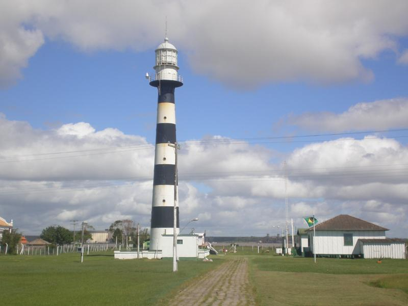 lighthouse